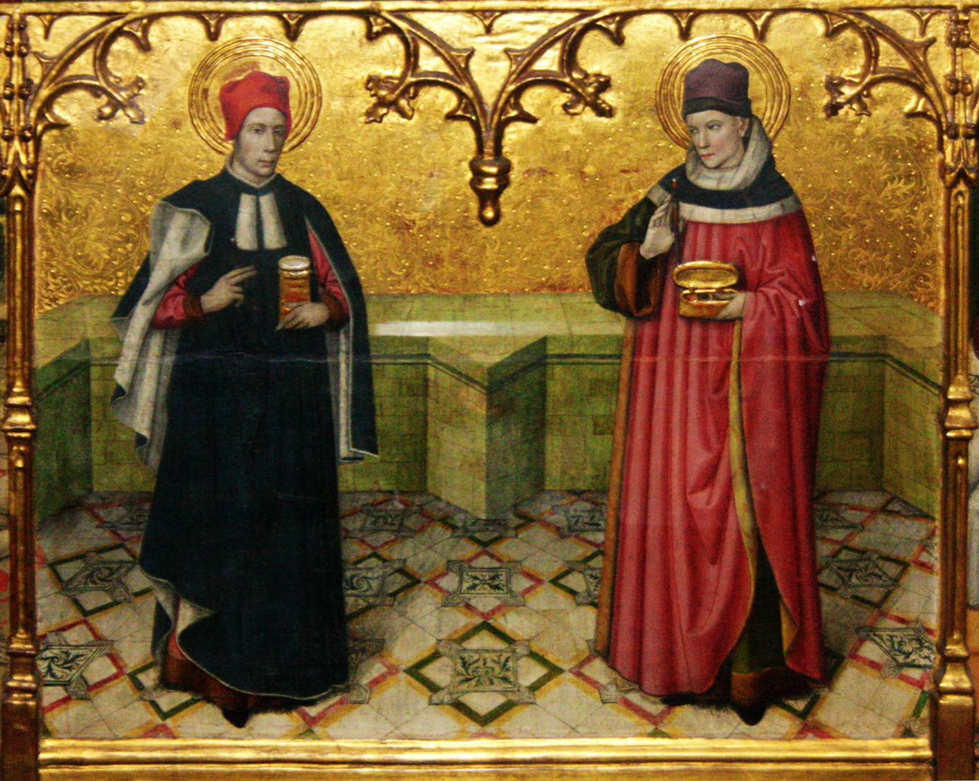 Retrat dels sants metges Cosme i Damià. És la taula central de la predel.la que està dedicada a aquests sants, dins el retaule dedicat als sants Abdó i Senén. El retaule és una de les poques obres que es poden atribuir amb tota certesa a Jaume Huguet, ja que se'n conserva el contracte de l'any 1460. Huguet és l´únic representant català de la tendència flamenca, que domina el període final del gòtic. A la taula central hi són representants els sants titulars, Abdó i Senén, prínceps de Pèrsia que van ser capturats i morts a Roma. Per causes desconegudes, sembla que les relíquies d'aquests sants van ser traslladades a Arlés del Tec (Vallespir) i d'aquí la rao que gaudissin d'un culte ben arrelat a Catalunya, invocats com a patrons de la pagesia i coneguts com Sant Nin i Sant Non. Composen el reatule un Calvari i quatre escenes relatives als sants. A la pradel.la es descriuen escenes del matitiri i la mort dels sants Cosme i Damià, metges amb un possible origen àrab i, com els anteriors, també molt venerats a Catalunya. Al guardapols, decoracions de tipus vegetals i les armes de Terrassa i Barcelona. Actualment es troba a l'Església de Sant Pere de Terrassa.